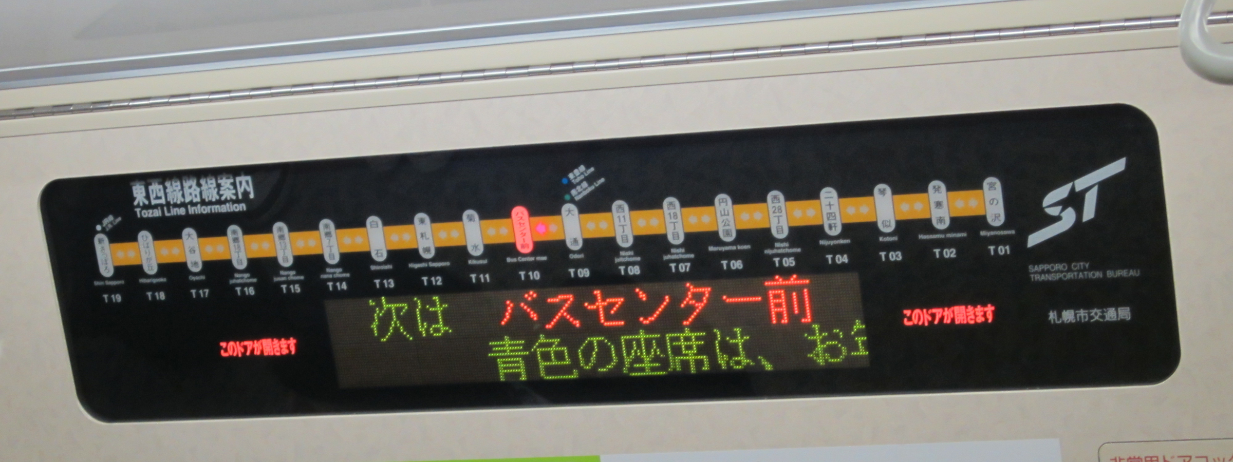 札幌市営地下鉄東西線8000形に設置された車内案内LED式表示器